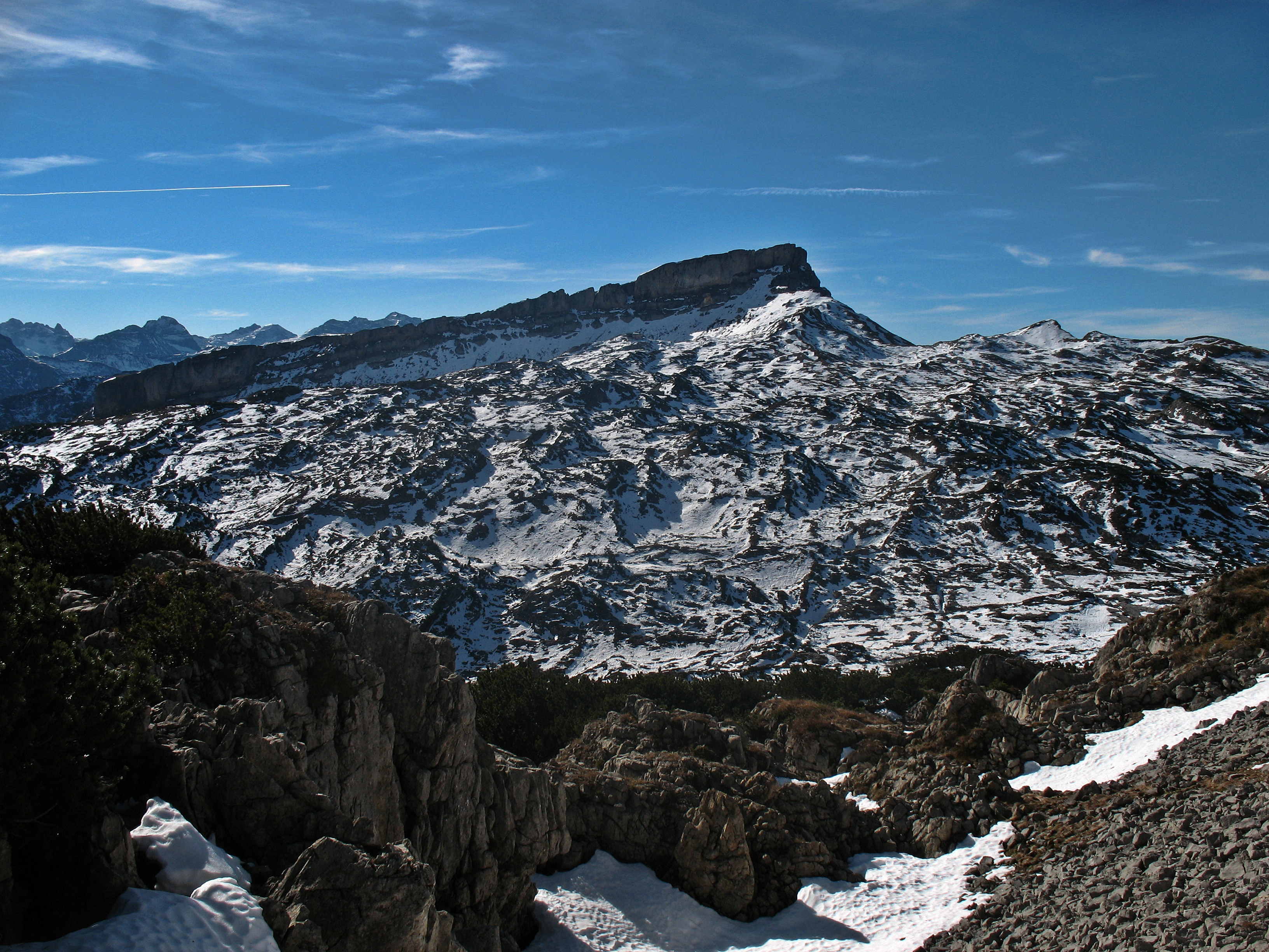 Blick von der Torkopfscharte (1967 m) nach Süden über des Gottesackerplateau zum Hohen Ifen (2229 m).